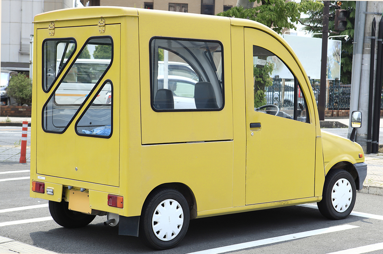 Daihatsu Mira Michito